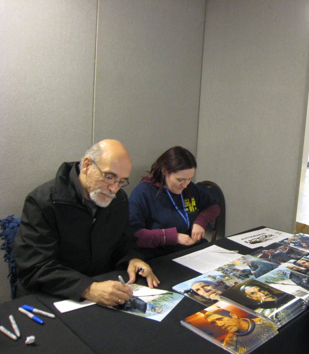 Collectormania 15 in Milton Keynes